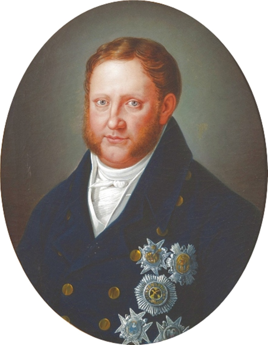 Ritratto di Francesco I Francesco I (Napoli 1777 - 1830) all'epoca del ritratto era ancora principe ereditario, dal momento che salì al trono soltanto nel 1825. Il dipinto appartiene ad una serie di dieci ritratti raffiguranti i membri della famiglia di Francesco I, eseguiti dal Cammarano, tra il 1818 e il 1820, come studi per la realizzazione di una grande tela che avrebbe dovuto celebrare appunto la famiglia reale. L'opera fu commissionata da Francesco I per festeggiare solennemente il sessantanovesimo compleanno di Ferdinando I suo padre, che cadeva appunto il 30 marzo 1820, oltre che l'arrivo nel 1819 del busto di Antonio Canova (cfr. scheda OA: 00051938, inv. n. 951 del 1977/78). Giuseppe Cammarano fu allievo di Domenico Chelli e suo collaboratore. A Napoli, entrò presto in contatto con il filone neoclassico tedesco e lavorò nella bottega di F. Fischetti. Dopo due anni di pensionato borbonico a Roma (1786), tornato a Napoli, fu impegnato nelle più importanti commissioni di corte. Nel 1806 gli fu data la cattedra di Nudo e la nomina di vicedirettore dell'Accademia di Disegno (in sostituzione di D. Mondo), passando poi nel 1822 alla cattedra di Paesaggio. Dopo altri due anni di pensionato, nel 1827 fu titolare della cattedra di Disegno insieme all'Angelini.